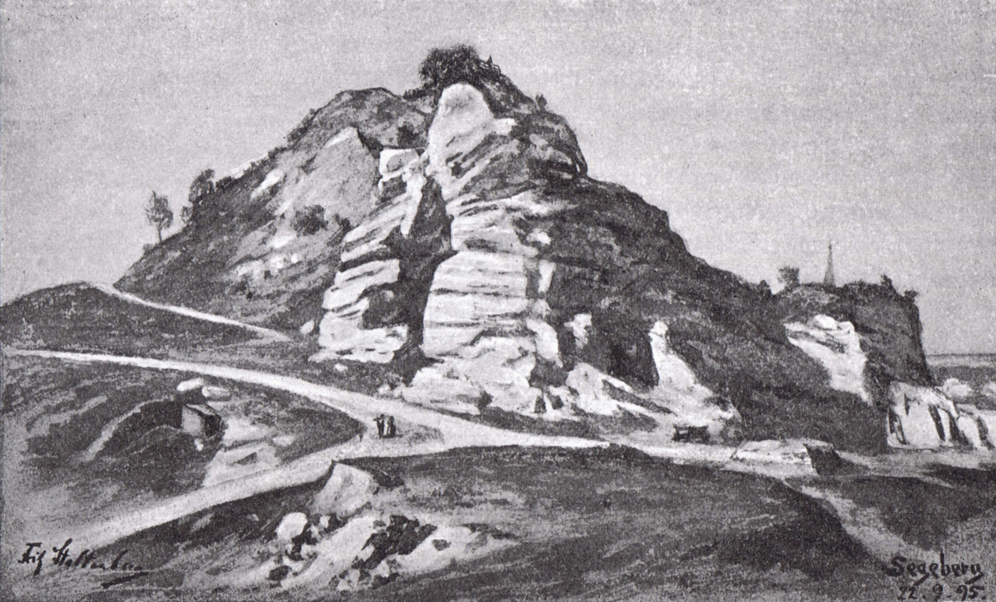 Zeichnung des Kalkbergs von Bad Segeberg aus dem Jahr 1895